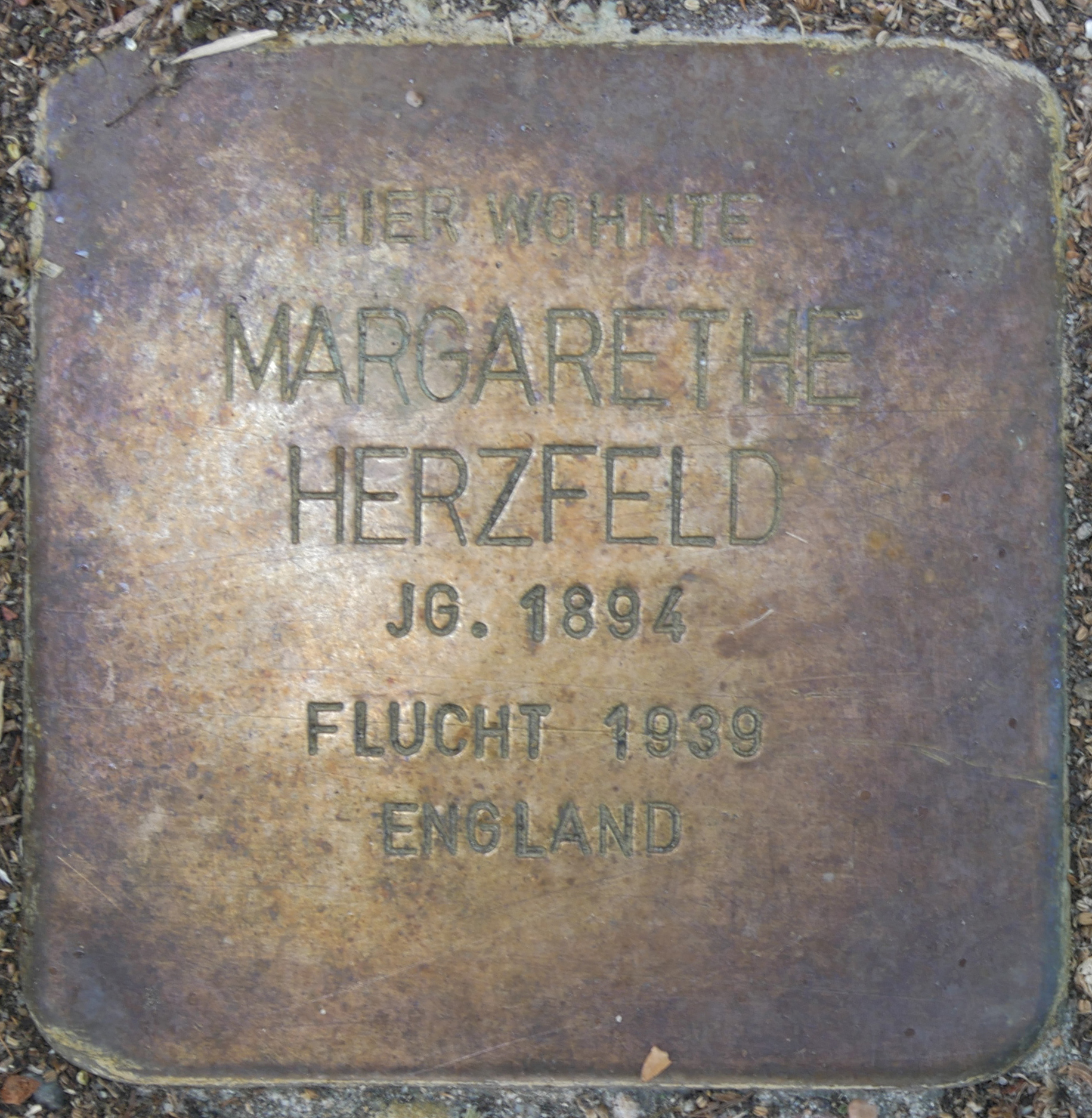 Stolpersteine Wesel: Herzfeld, Margarethe